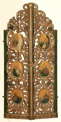 Царскія вароты Museum of Belarusian Folk Art Native nameМузей беларускага народнага мастацтваLocationMinsk district, BelarusCoordinates54° 03′ 36″ N, 27° 44′ 22″ E Established1979Website